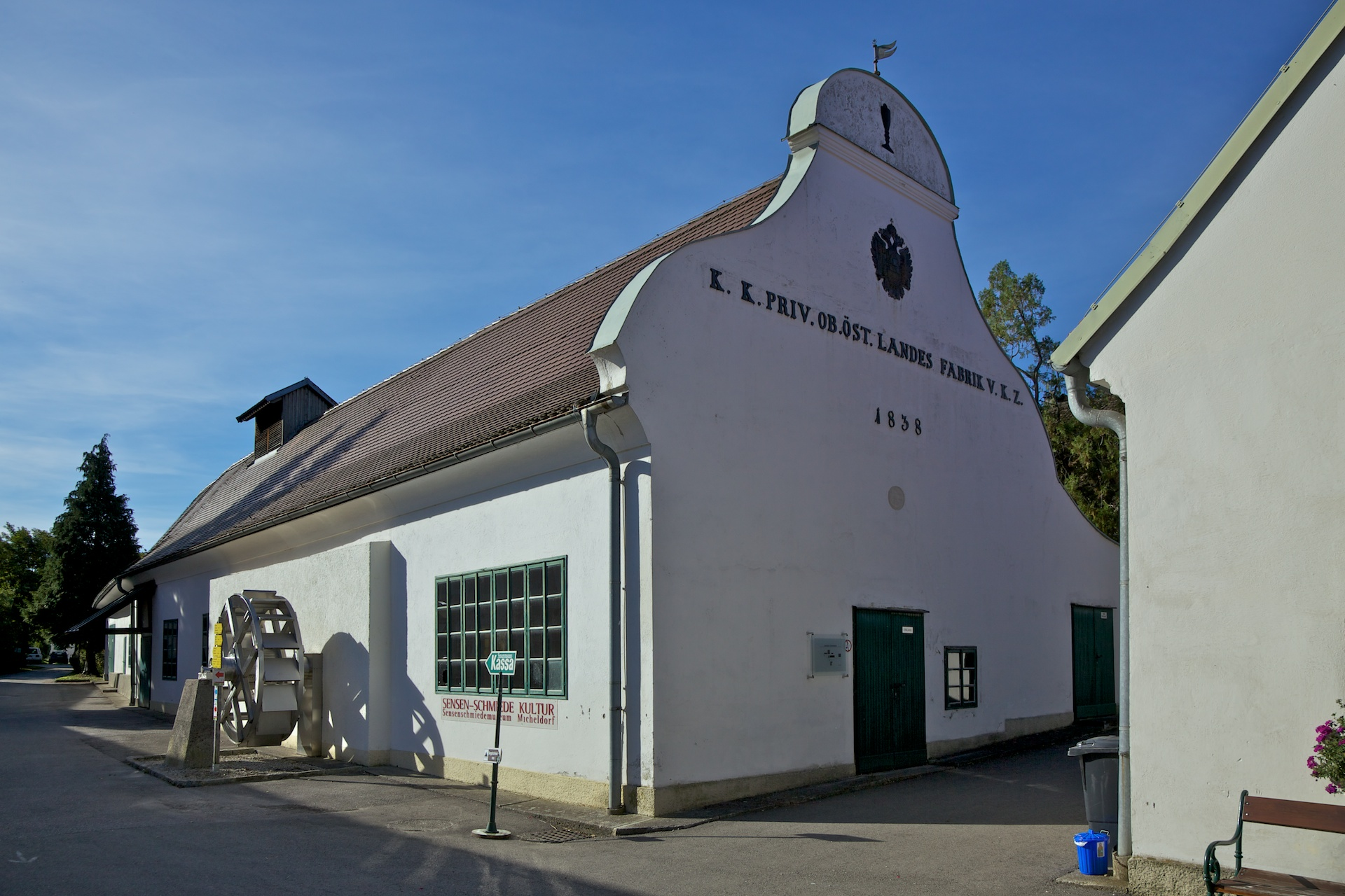 Schmiedehammer, Gradn-Hammer